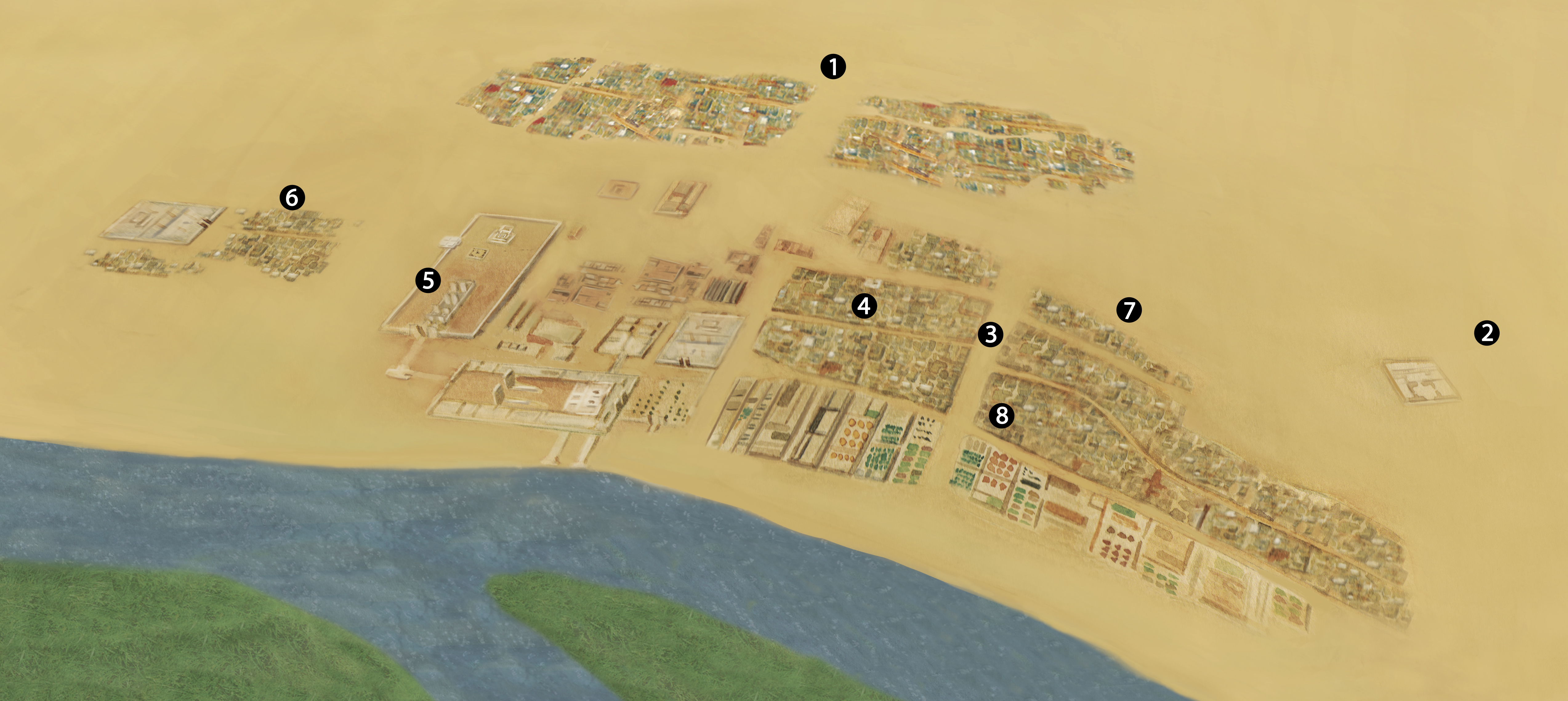 Recreació en detall de la ciutat d'Amarna a vista d'ocell com hauria estat cap al 1340 a.C on podem trobar la vila dels treballadors, Kom el-Nana, la ciutat central, la ciutat principal, el gran temple d'Aton, el barri Nord, el barri Sud i les cartes d'Amarna. La ciutat ha estat recreada a partir del coneixement arqueològic actual (2014). 1. Vila dels treballadors 2. Kom el-Nana 3. Ciutat central 4. Ciutat principal 5. Gran temple d'Aton 6. Barri Nord 7. Barri Sud 8. Cartes d'Amarna This image was provided to Wikimedia Commons as a contribution from an Art&Design School thanks of a collaboration between Escola d'Art del Treball and Amical Wikimedia.